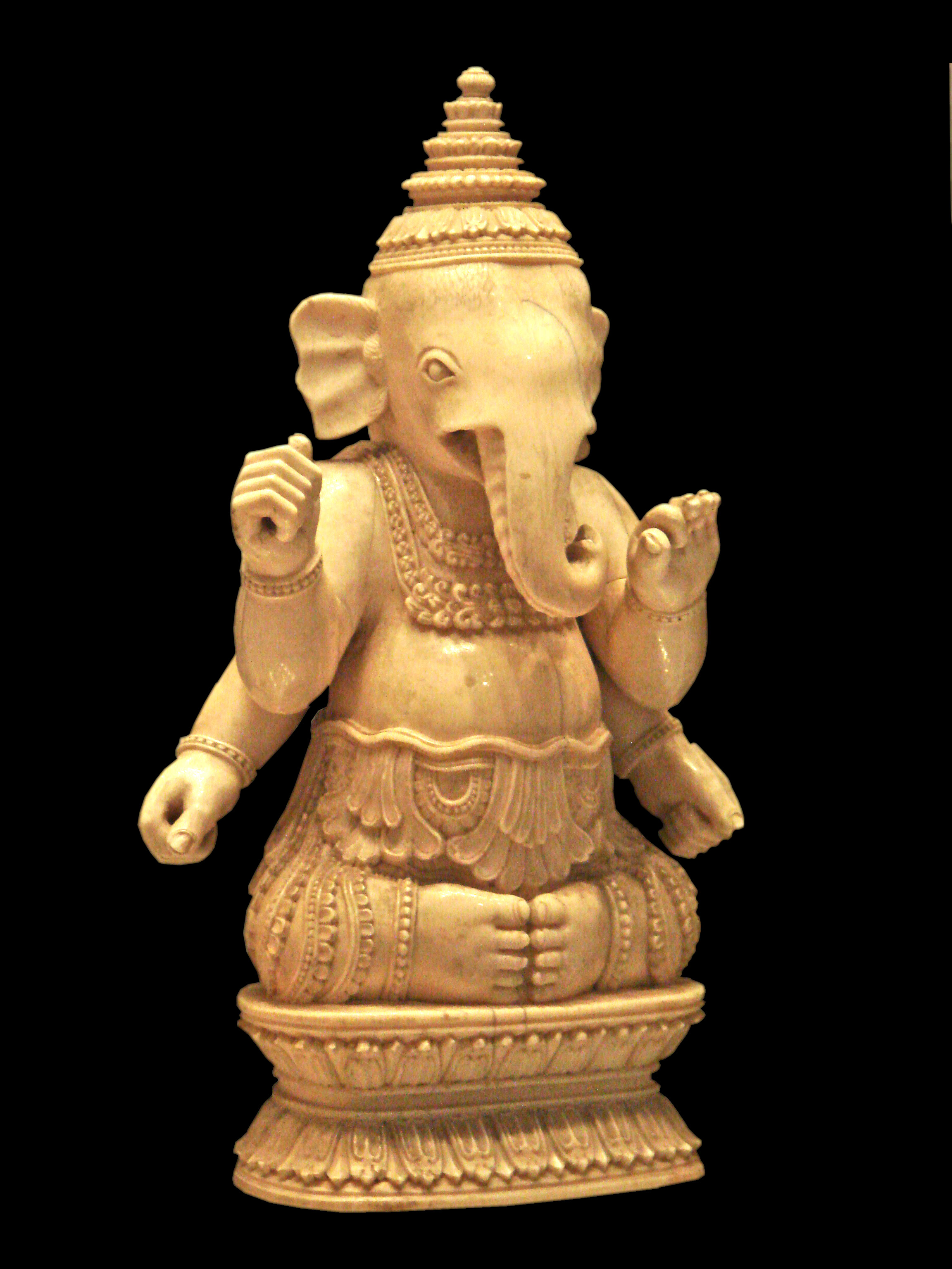 Ganesha Inde du sud 19ème siècle Ivoire Musée des arts asiatiques de Dahlem Berlin